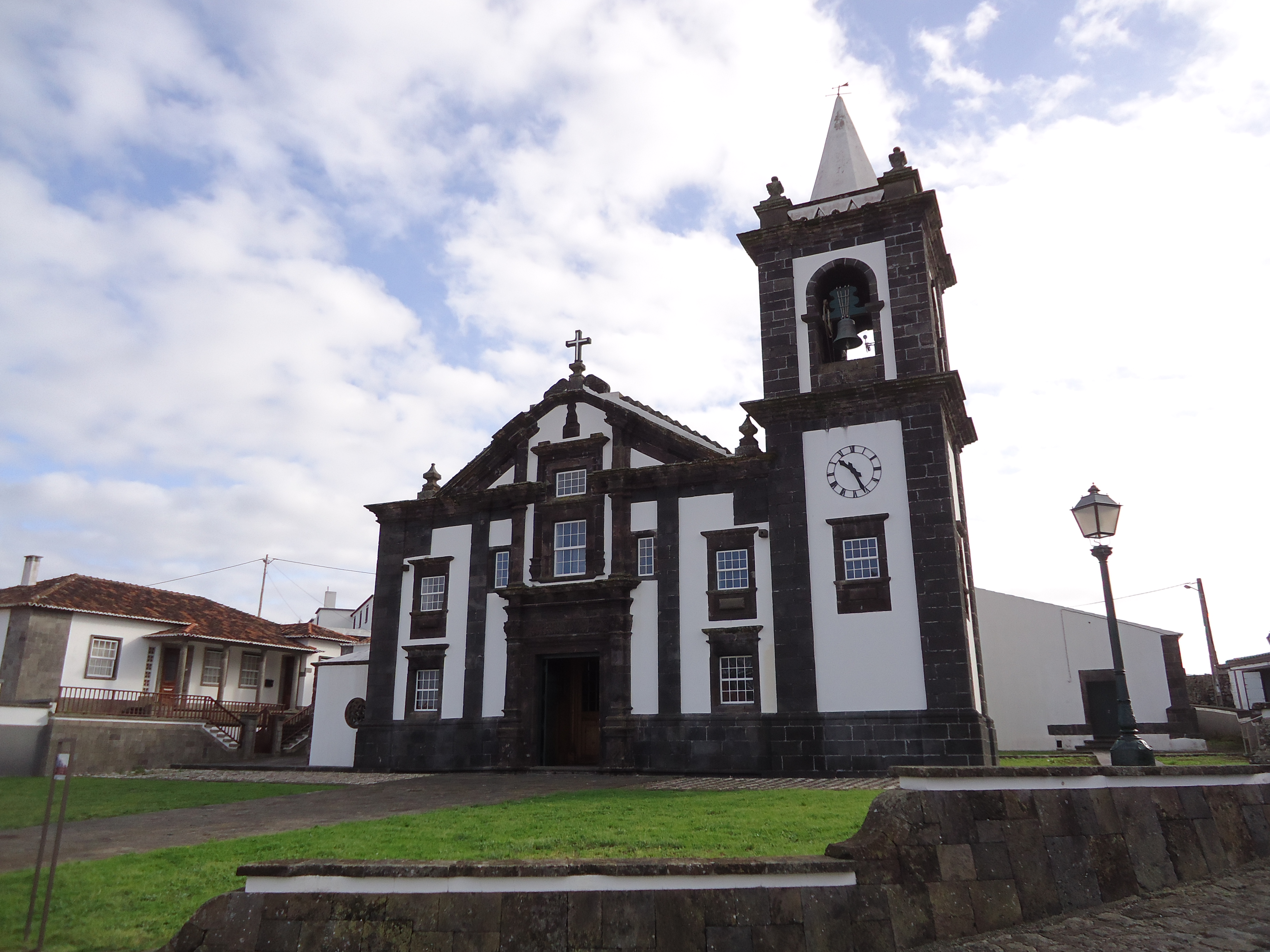 Igreja Matriz, Santa Cruz da Graciosa, ilha Graciosa, Açores, Portugal: alçado principal.